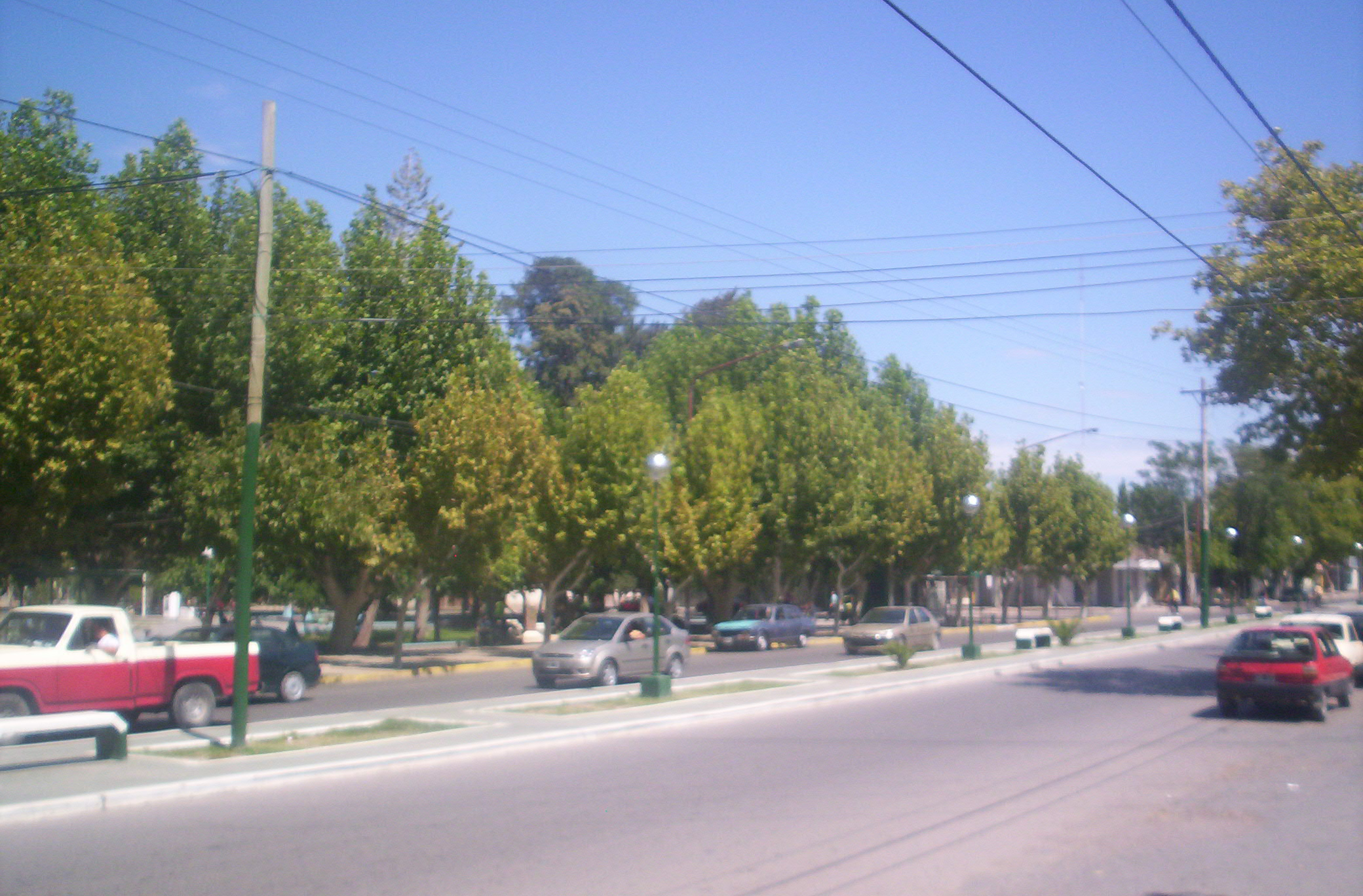 Vista de la calle principal de la ciudad de Caucete, provincia de San Juan Argentina